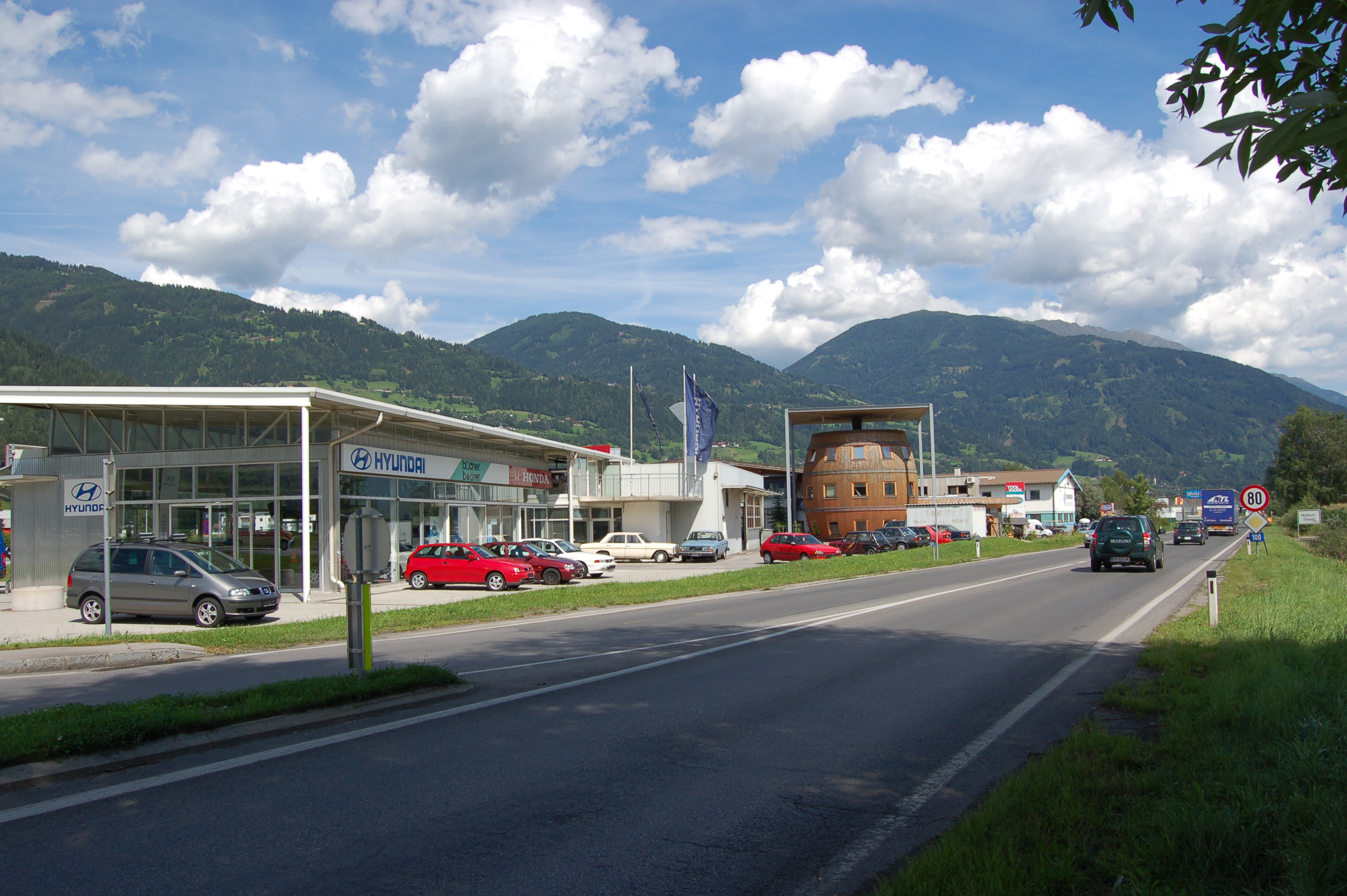 Das Betriebsansiedlungsgebiet an der Bundesstraße B100